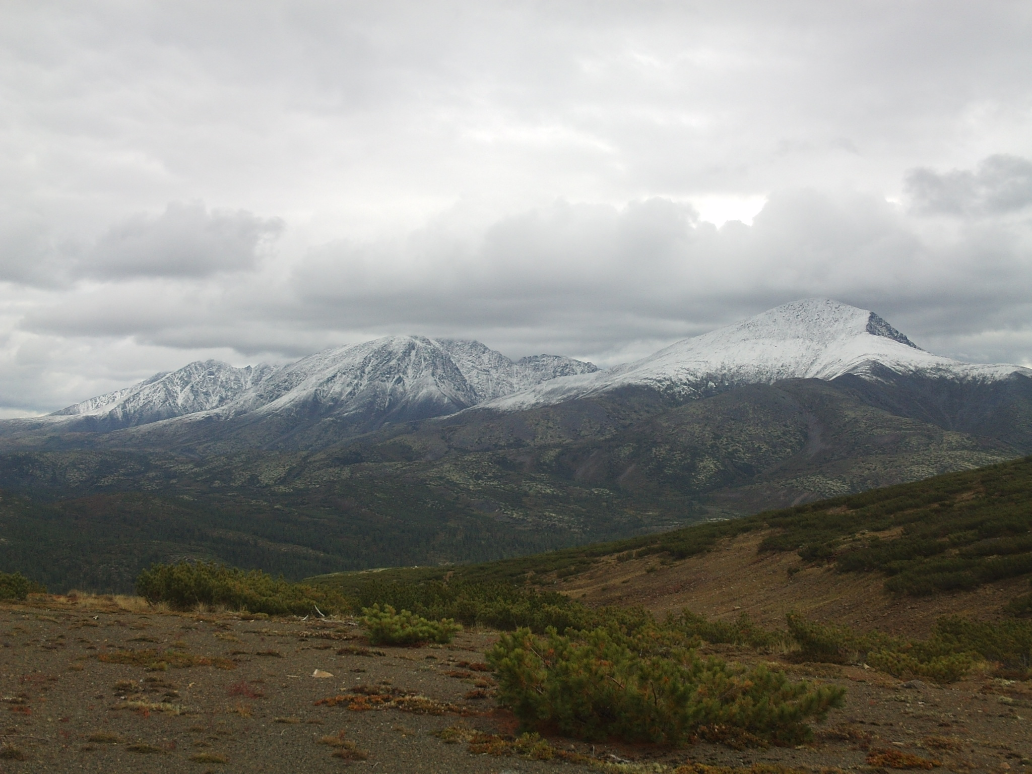 Вид на голец Иняптук в Северобайкальском районе Бурятии, Восточная Сибирь.